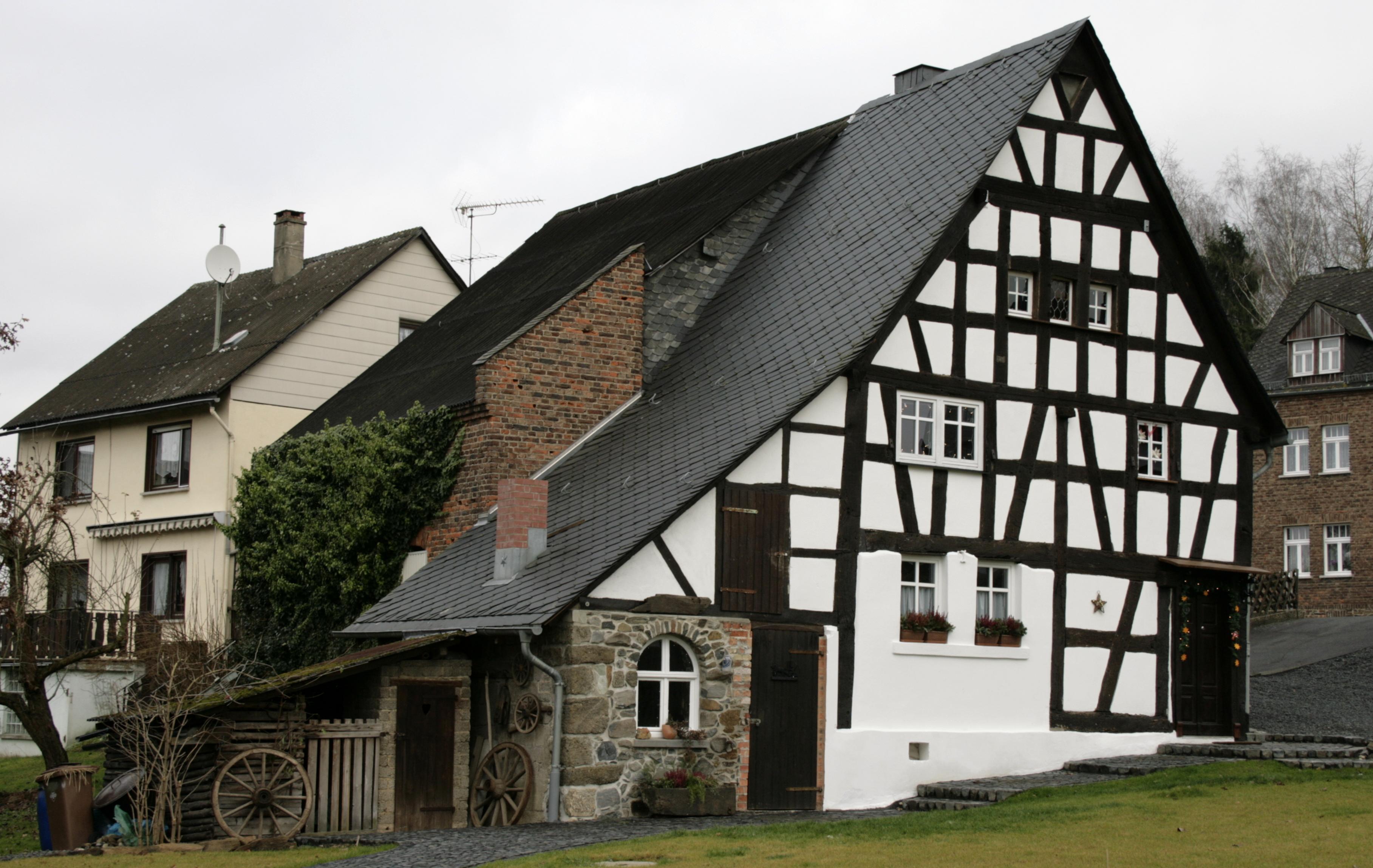 Dorfmuseum in Dornburg-Thalheim, Deutschland